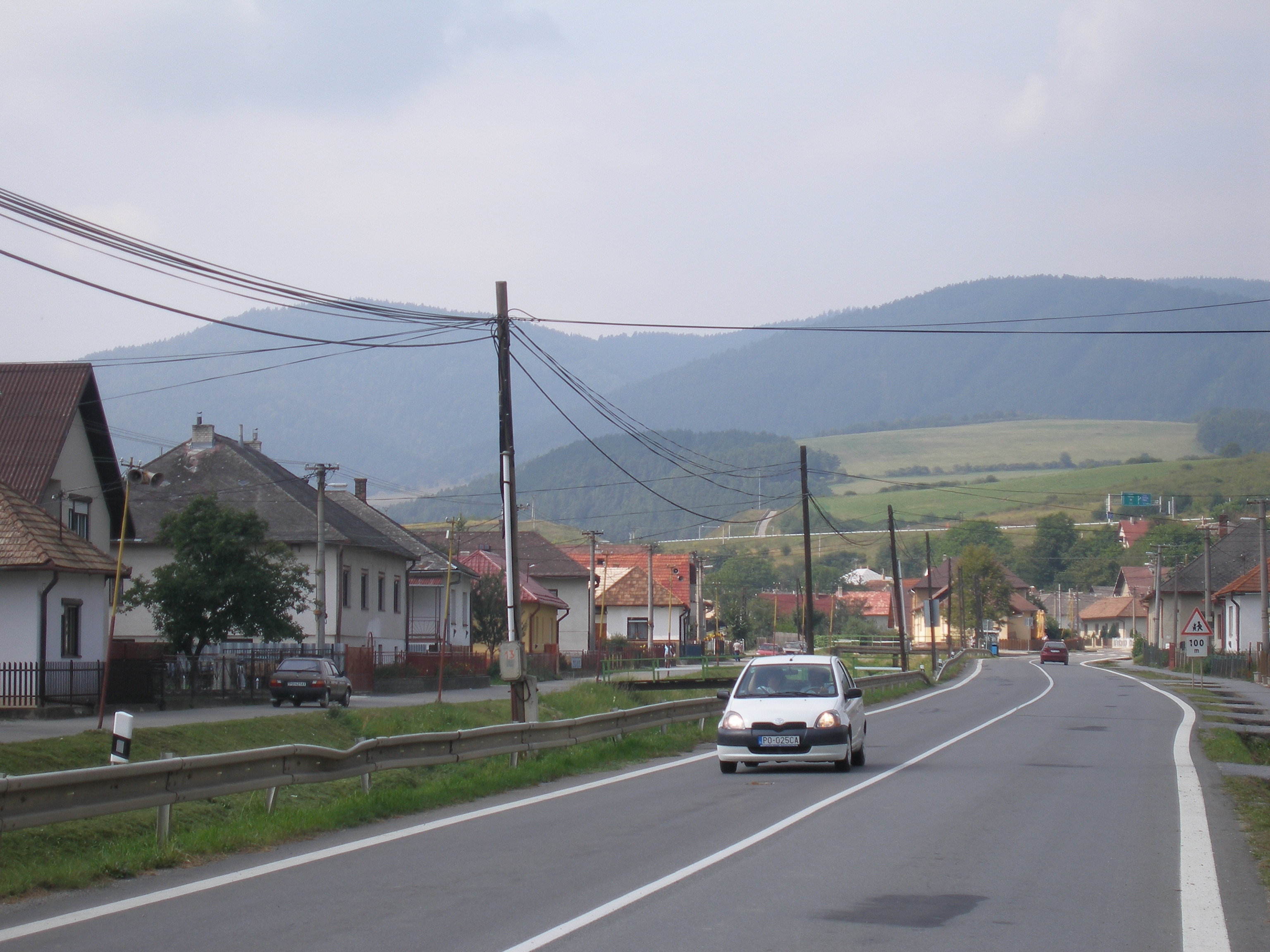 Šarišská obec Fričovce